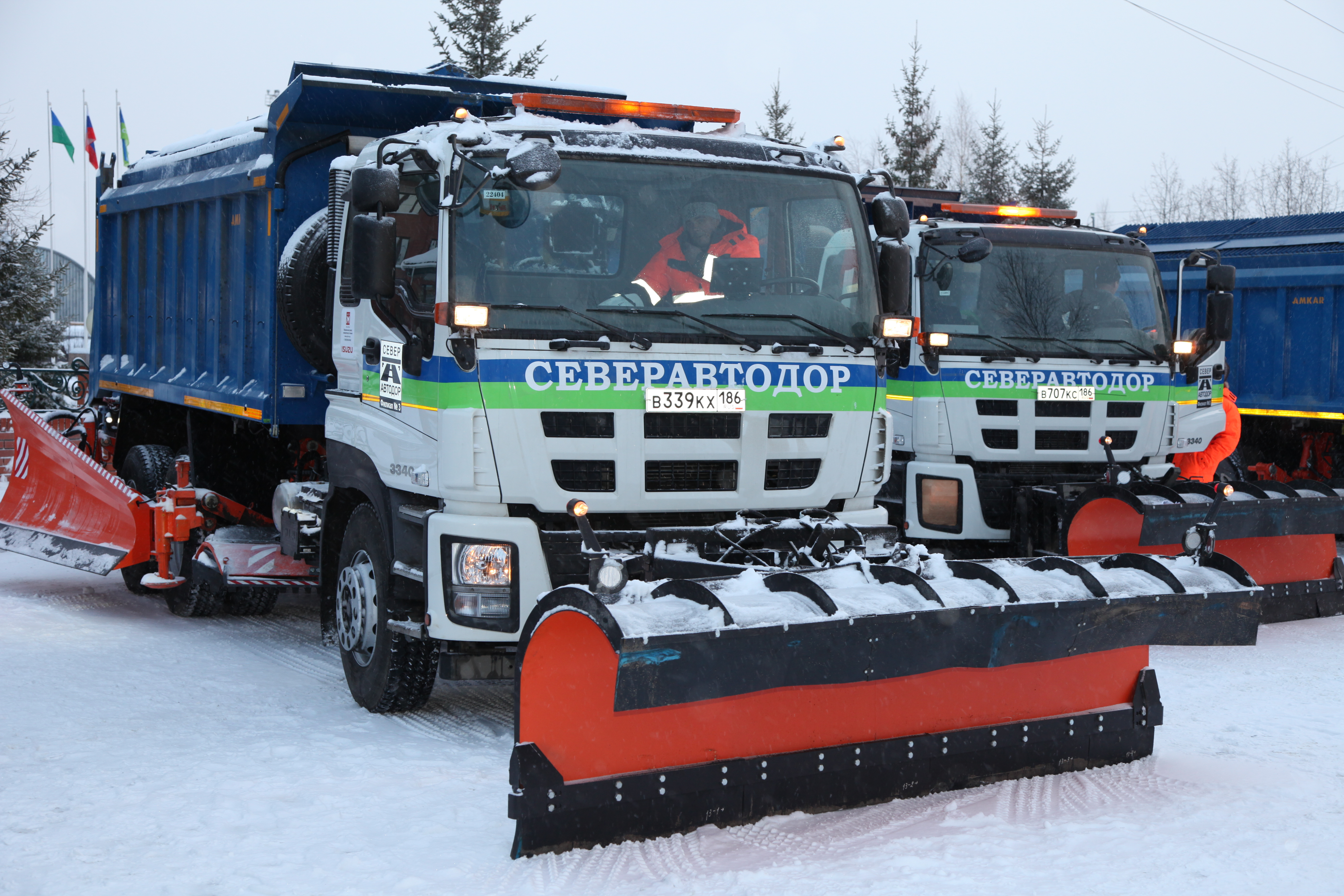 Новая техника